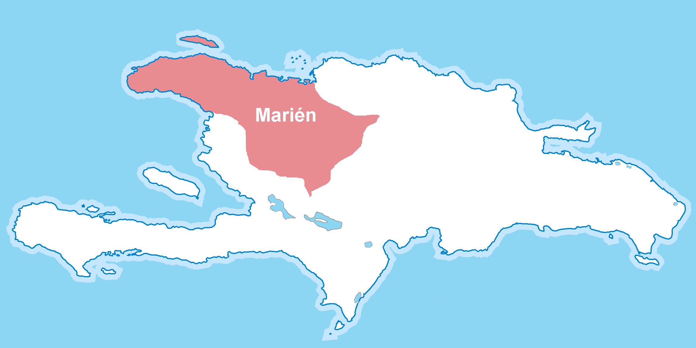 Marién